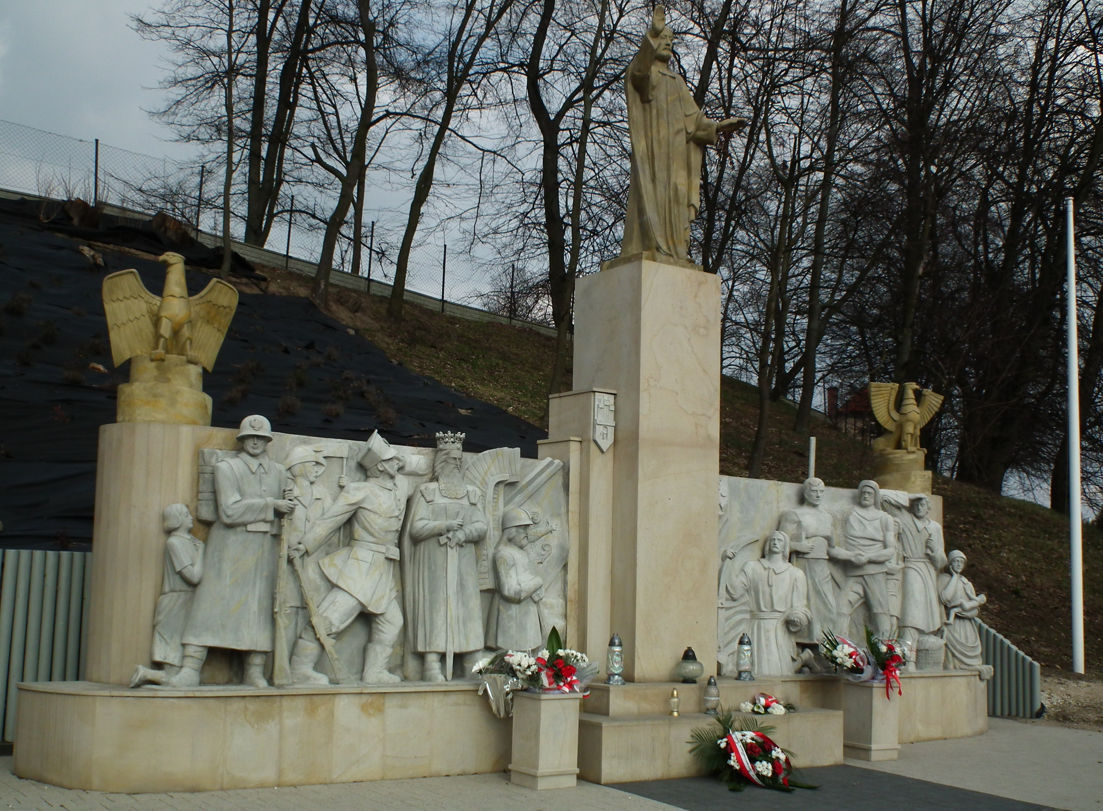 Pomnik Wdzięczności ku czci Chrystusa Króla - Sępólno Krajeńskie.